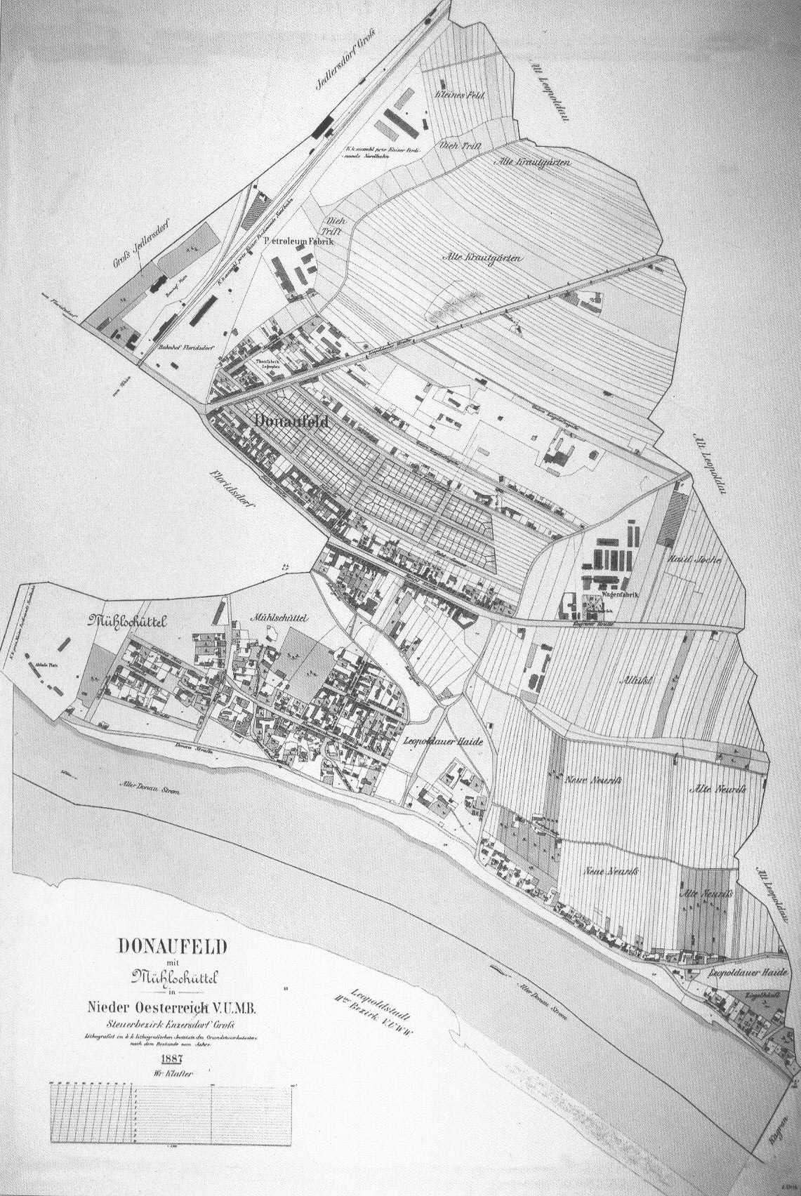 Map of Donaufeld (Wien)